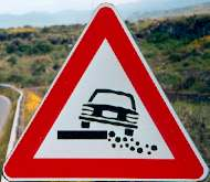 SICILE : Accotement non stabilisé